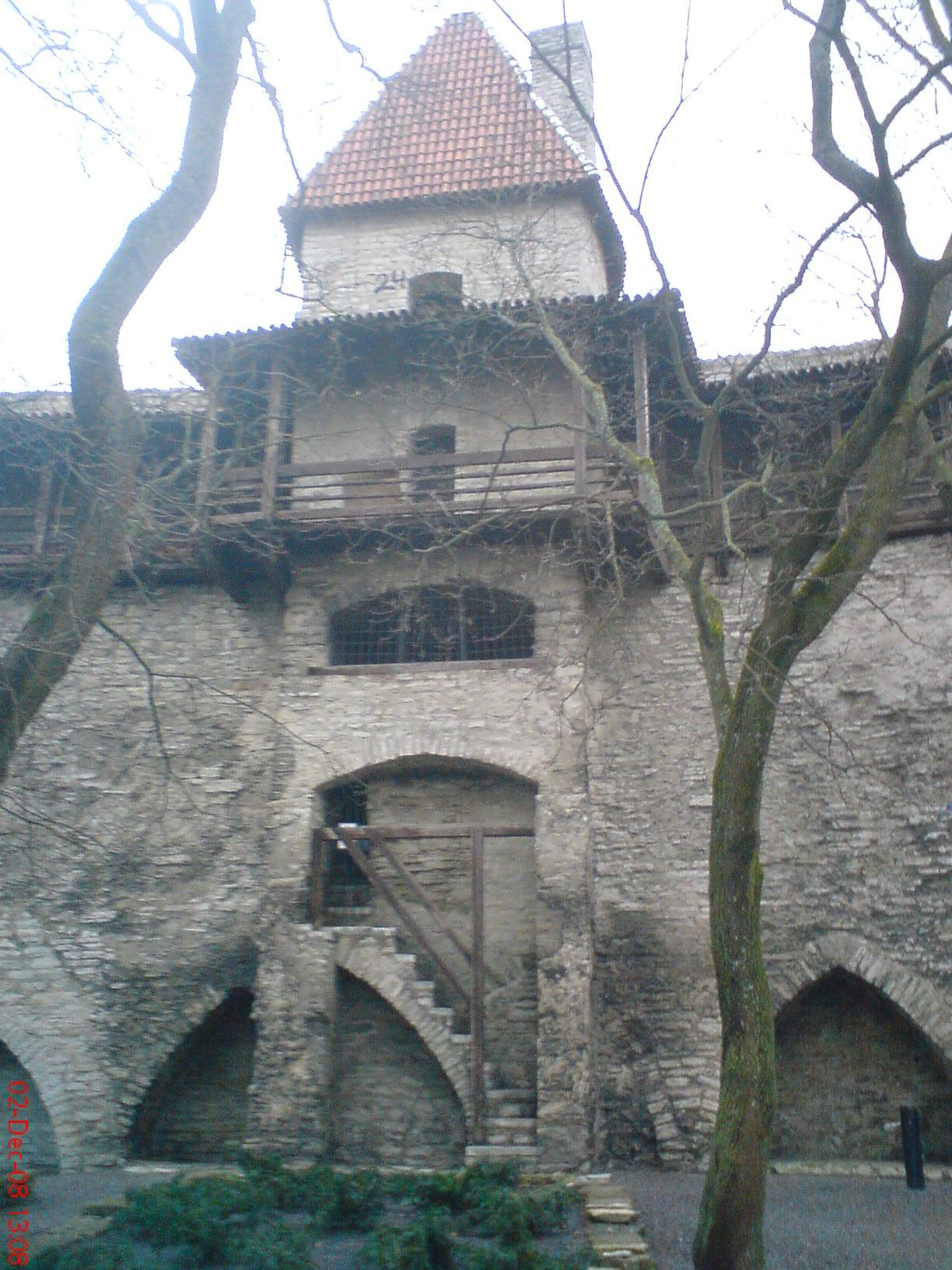 Tallinna linnamüüri Tallitorn, vaade Taani kuninga aiast